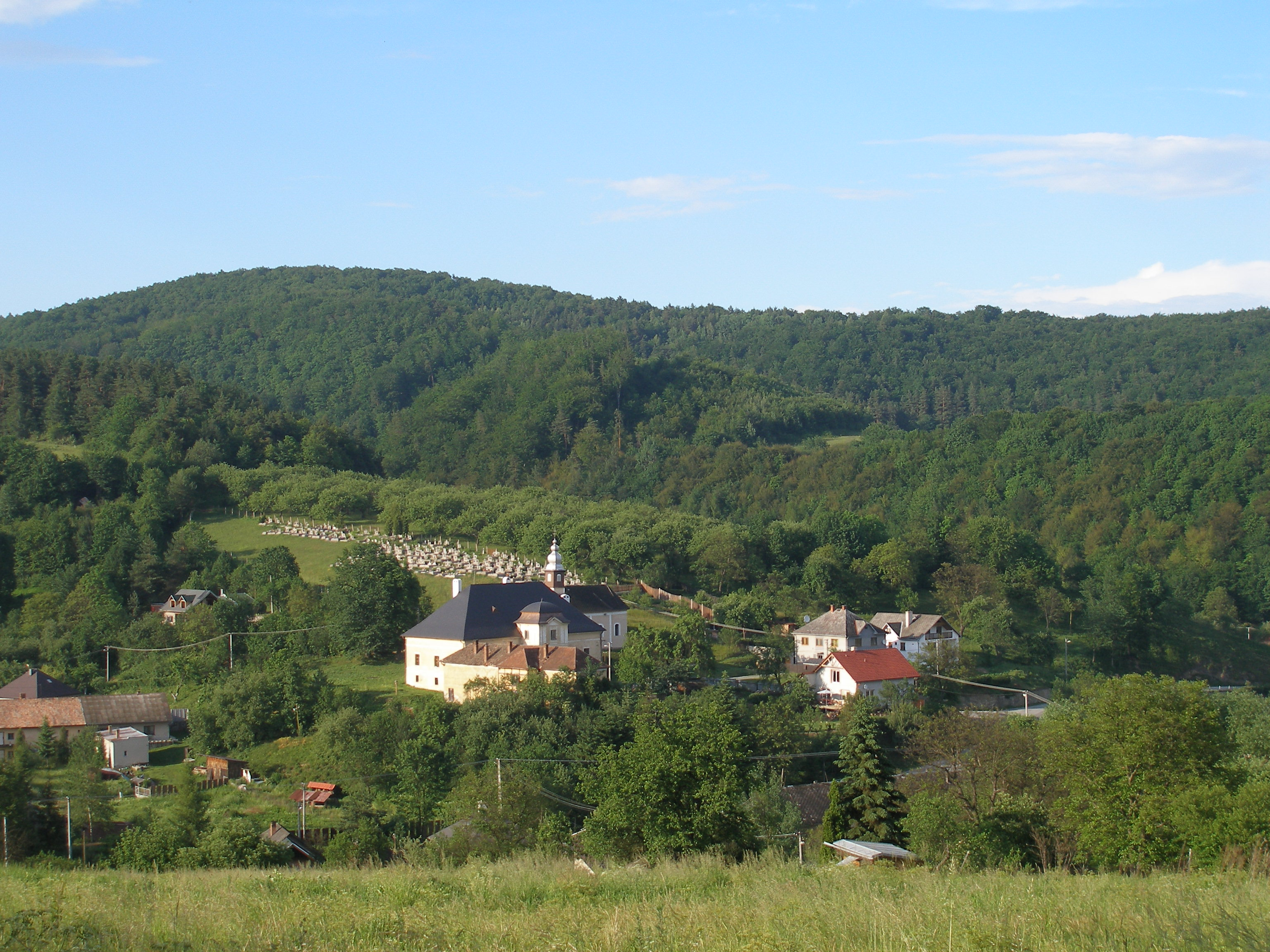 Šarišská vrchovina, región Šariš, obec Žipov